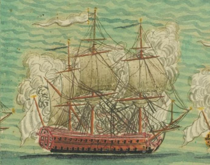 Vaisseau français de 74 canons le Guerrier à la bataille de Minorque en 1756. Guerre de Sept Ans. Aquarelle. Détail.